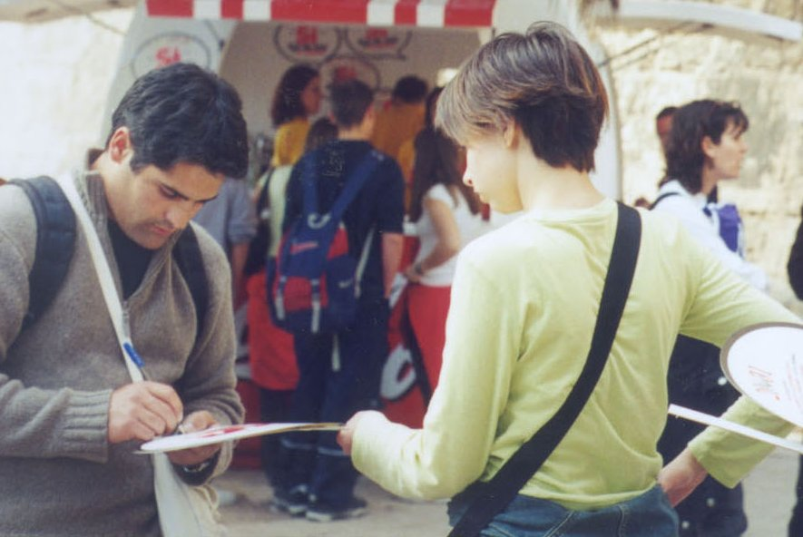 El cantant d'Antònia Font, Pau Debon, signant autògrafs a una manifestació de l'Obra Cultural Balear.